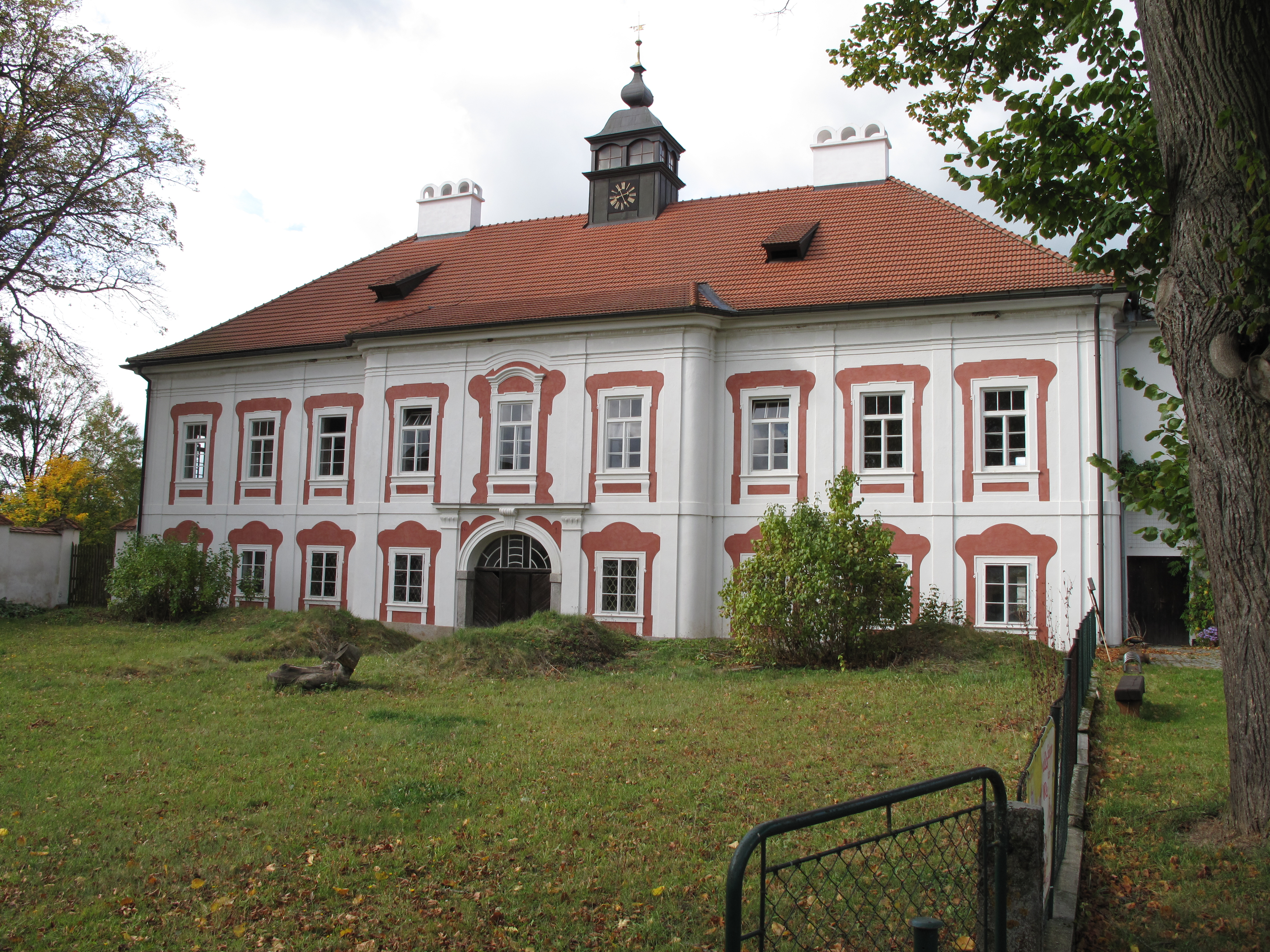 Mlázovy. Okres Klatovy, Česká republika.